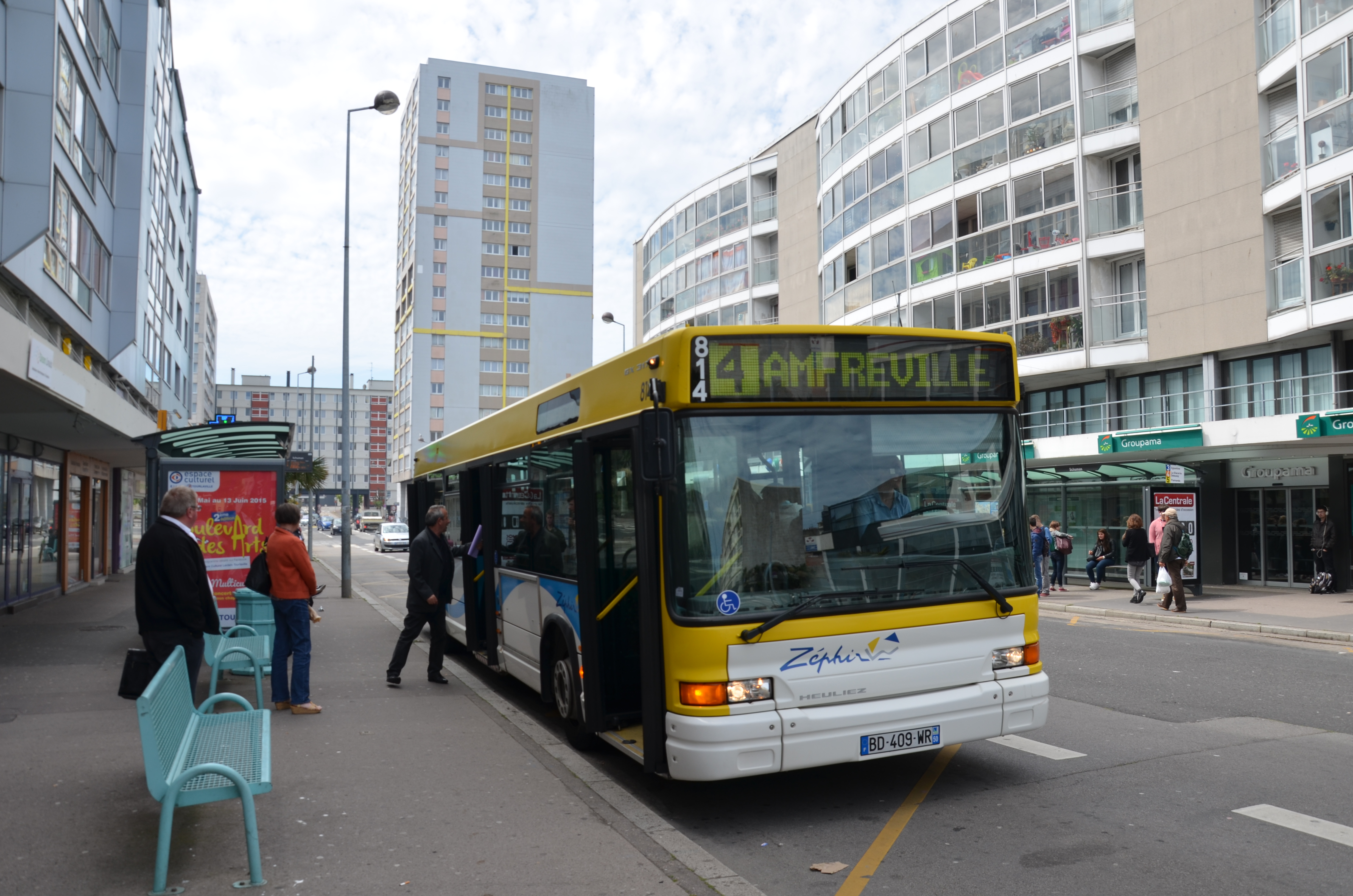 Heuliez GX 317 n°814 vu sur la ligne 4 du réseau Zéphir Bus de Cherbourg, au pôle d'échanges Schuman.